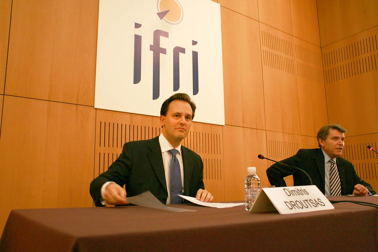 Ομιλία Αναπληρωτή Υπουργού Εξωτερικών κ. Δημήτρη Δρούτσα στο Γαλλικό Ινστιτούτο Διεθνών Σχέσεων (Institut français des relations internationales-IFRI) με θέμα «Proactive foreign policy in times of economic hardship: the case of Greece and the case of European Union». 29/06/2010. Φωτογραφία: Υπουργείο Εξωτερικών.